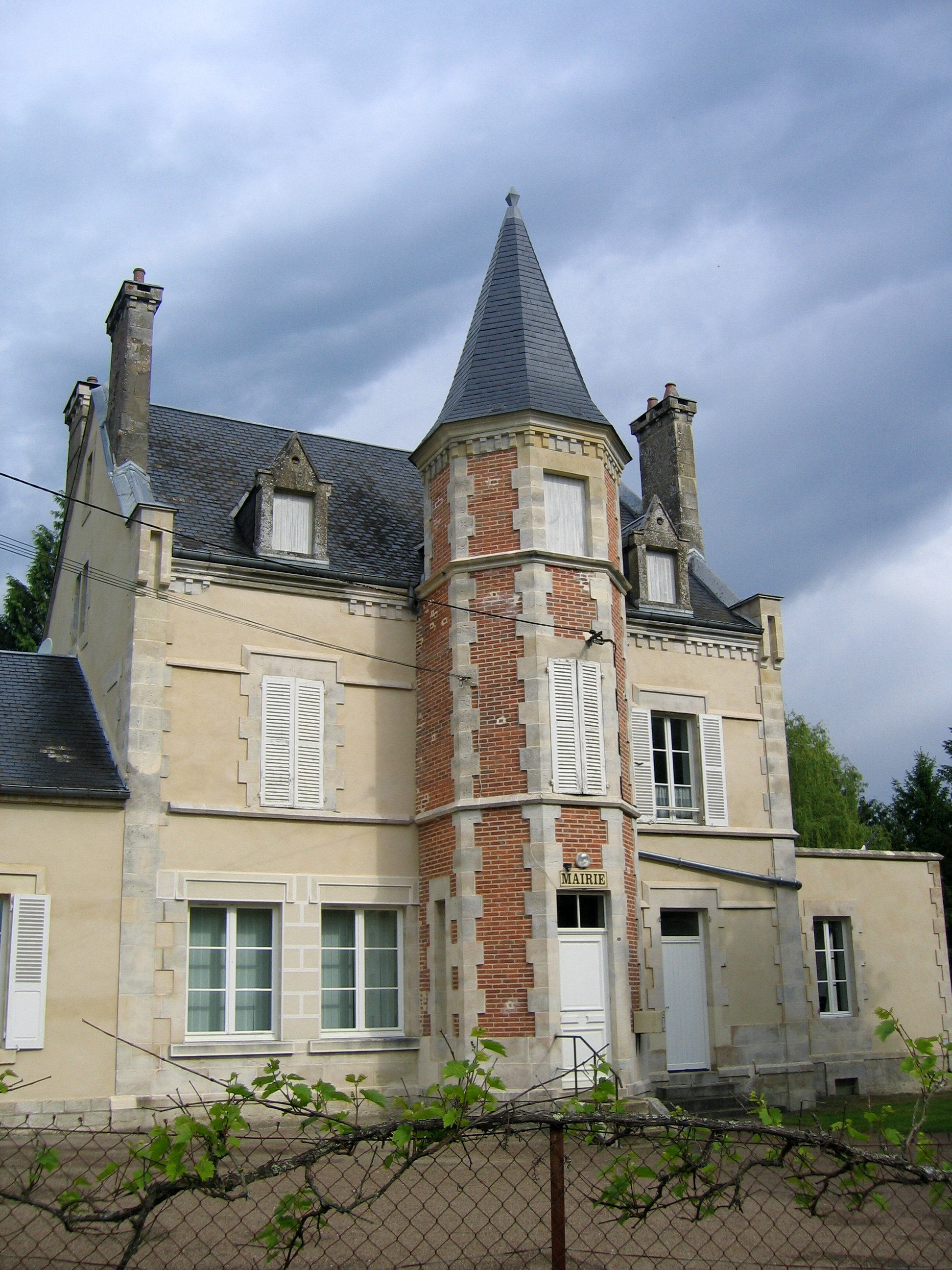 La mairie de Colméry